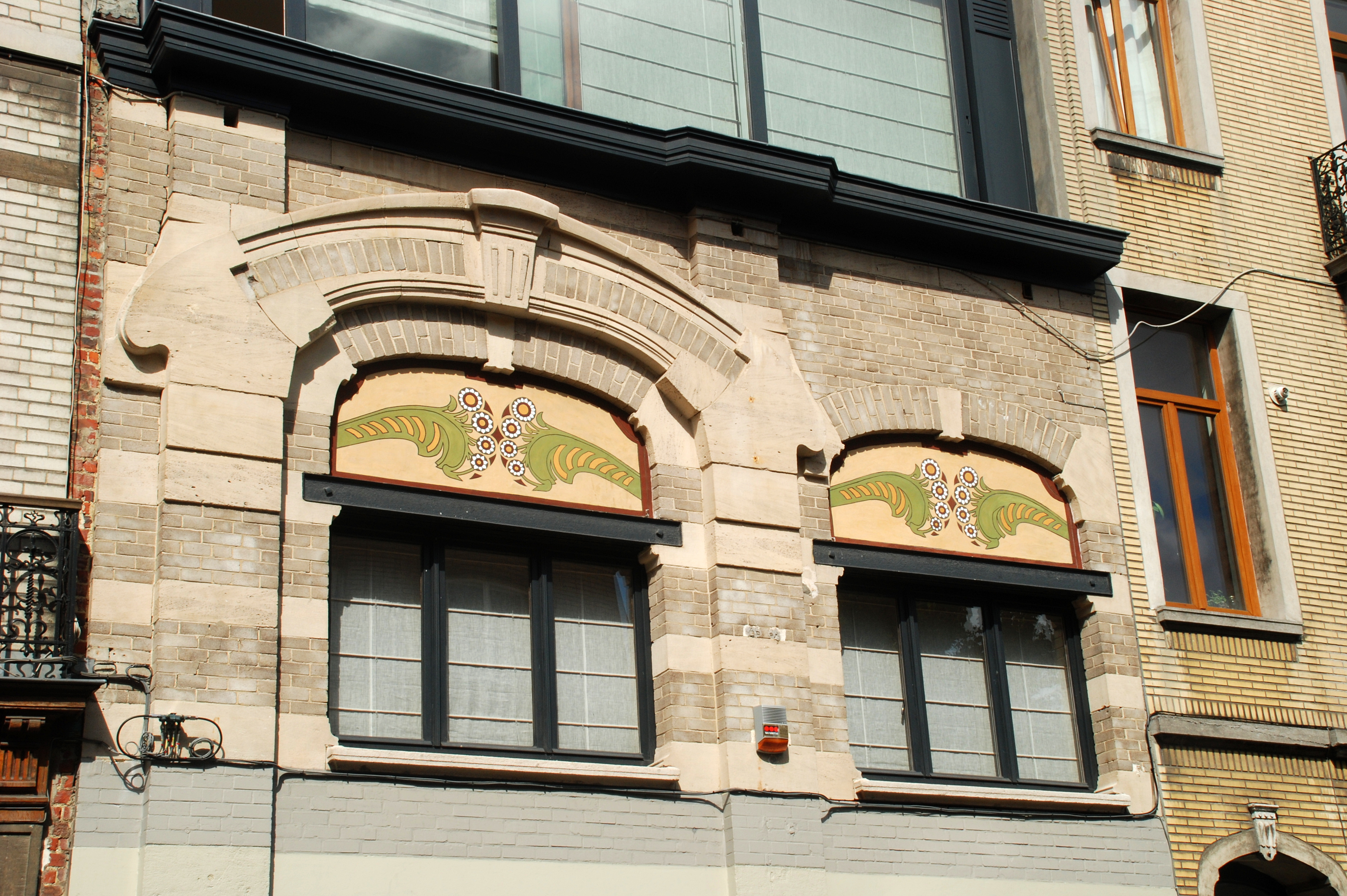 Belgique - Bruxelles - Atelier de sculpture de Jacques Sermon et Henri Pletinckx